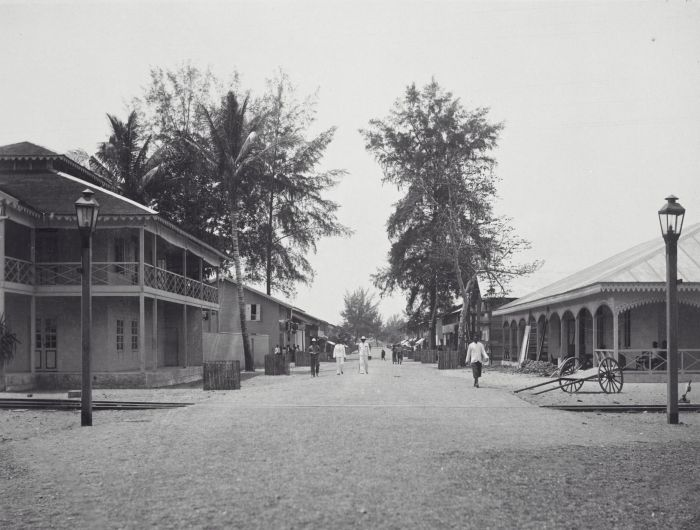 Foto. Straatgezicht in Lhokseumawe, Atjeh